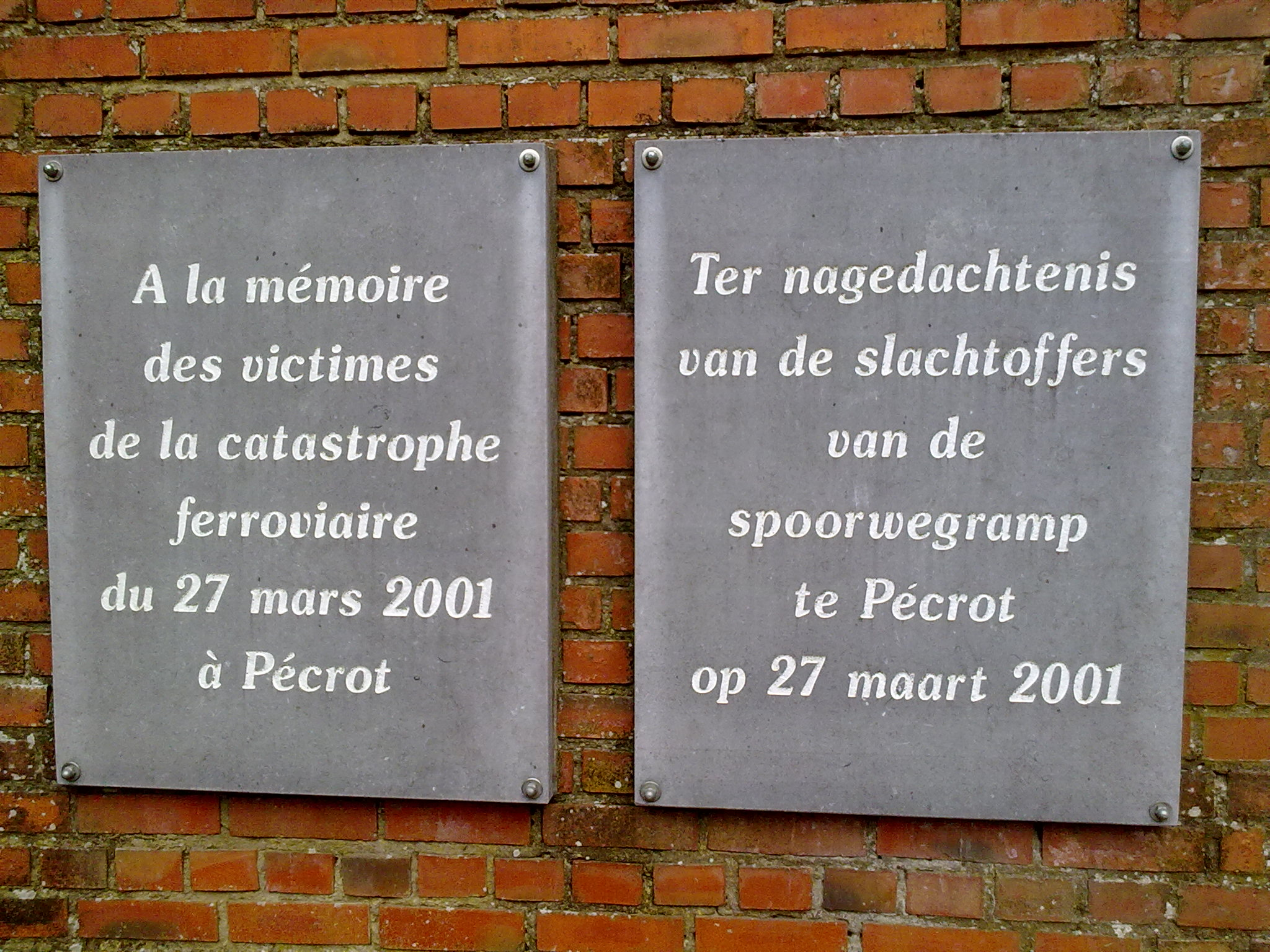 Plaques commémoratives en Français et Néerlandais de l'accident ferroviaire de Pécrot du 27 mars 2001 (Brabant Wallon) Belgique.